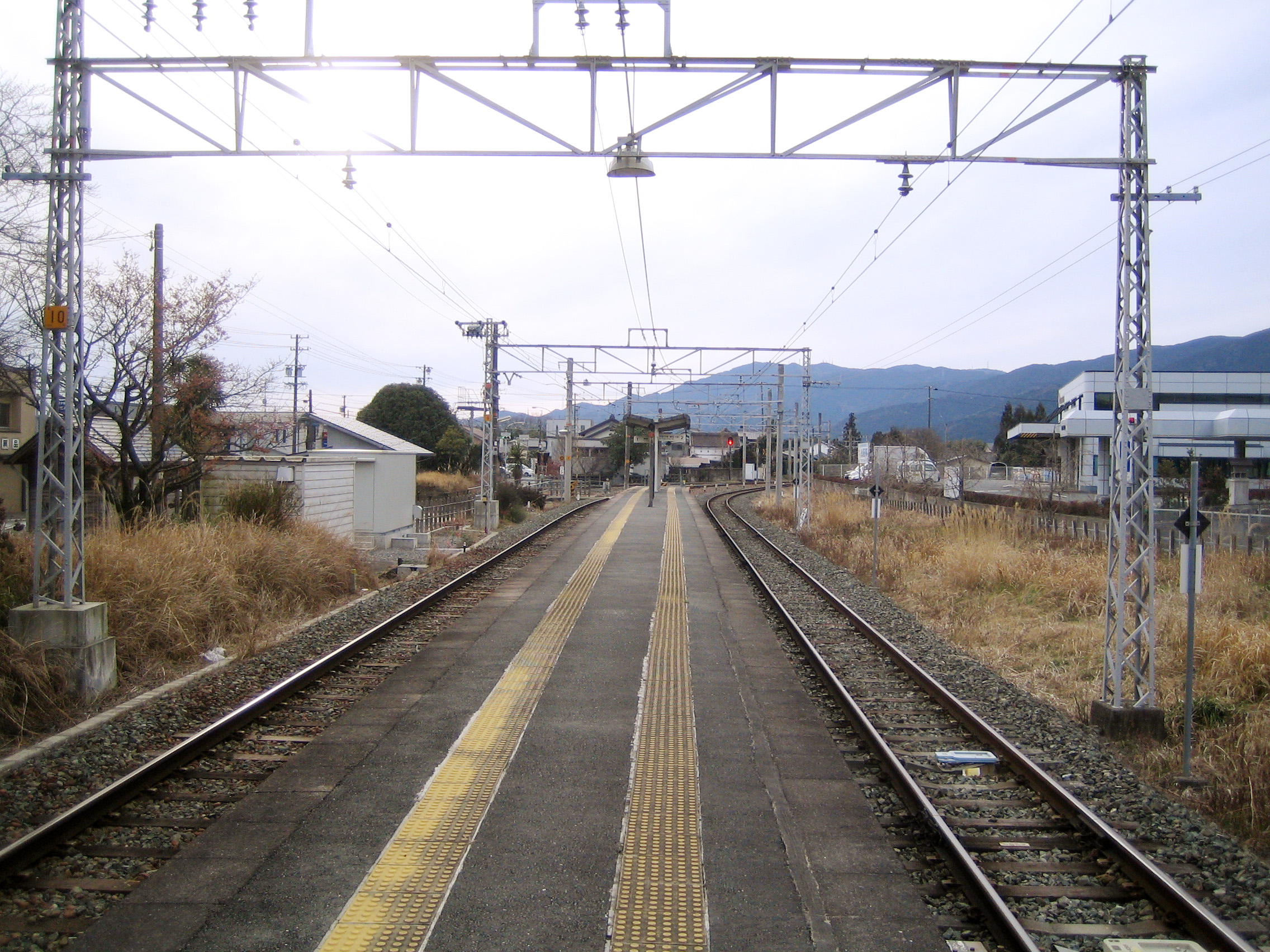 三河東郷駅。愛知県新城市Mikawa-Togo Station (三河東郷駅 Mikawa-Tōgō Eki), located in Shinshiro, Aichi, Japan